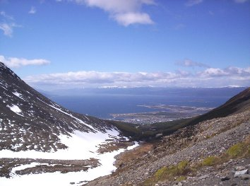 Ushuaia, la ciudad mas austral de Argentina